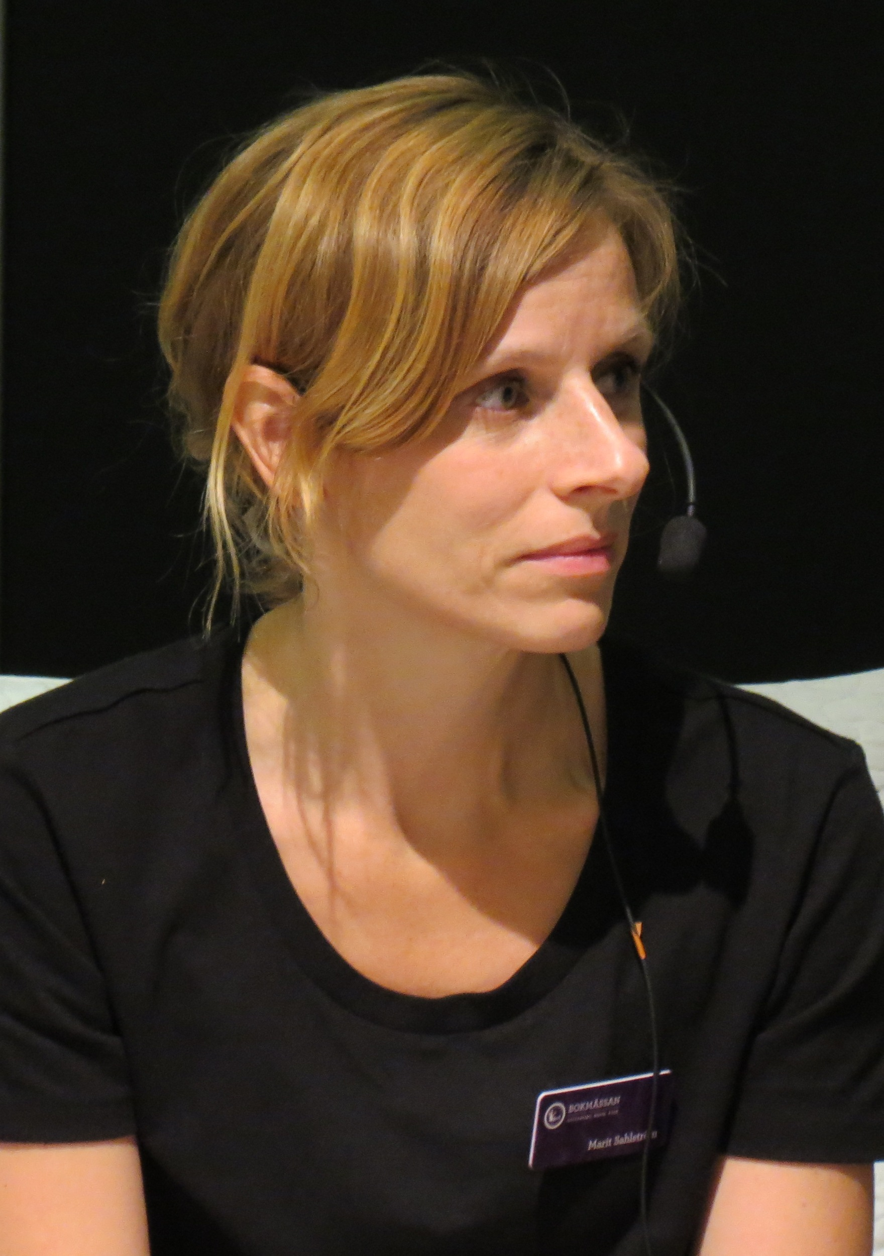 Marit Sahlström intervjuas på Bokmässan fredagen 25 september 2015.